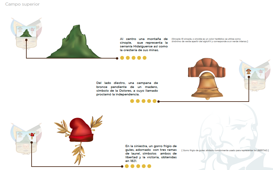 Esquema de descripción del campo superior del Escudo del Estado de Hidalgo.